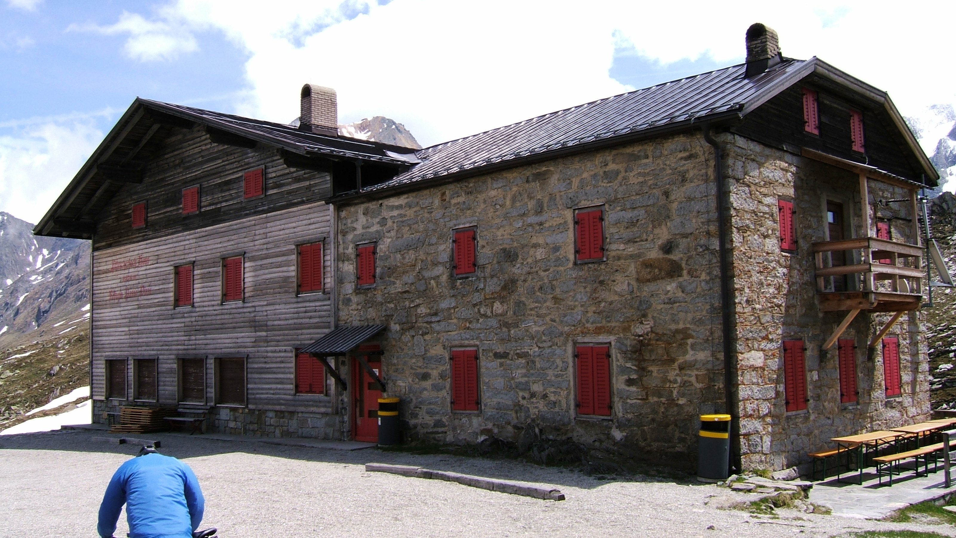 Die Pfitscherjoch Hütte im Juni, Foto selbst gemacht